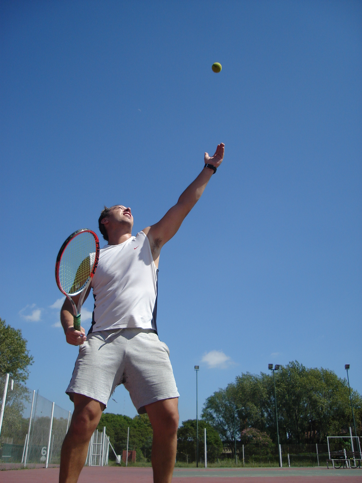 Julian M. Werner Apodo Juligan, Hulkligan